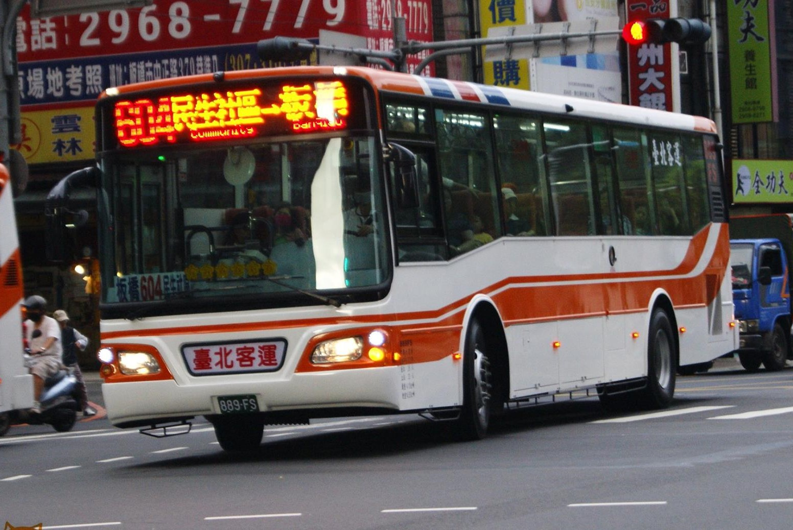 台北客運889-FS 604雙門復康巴士